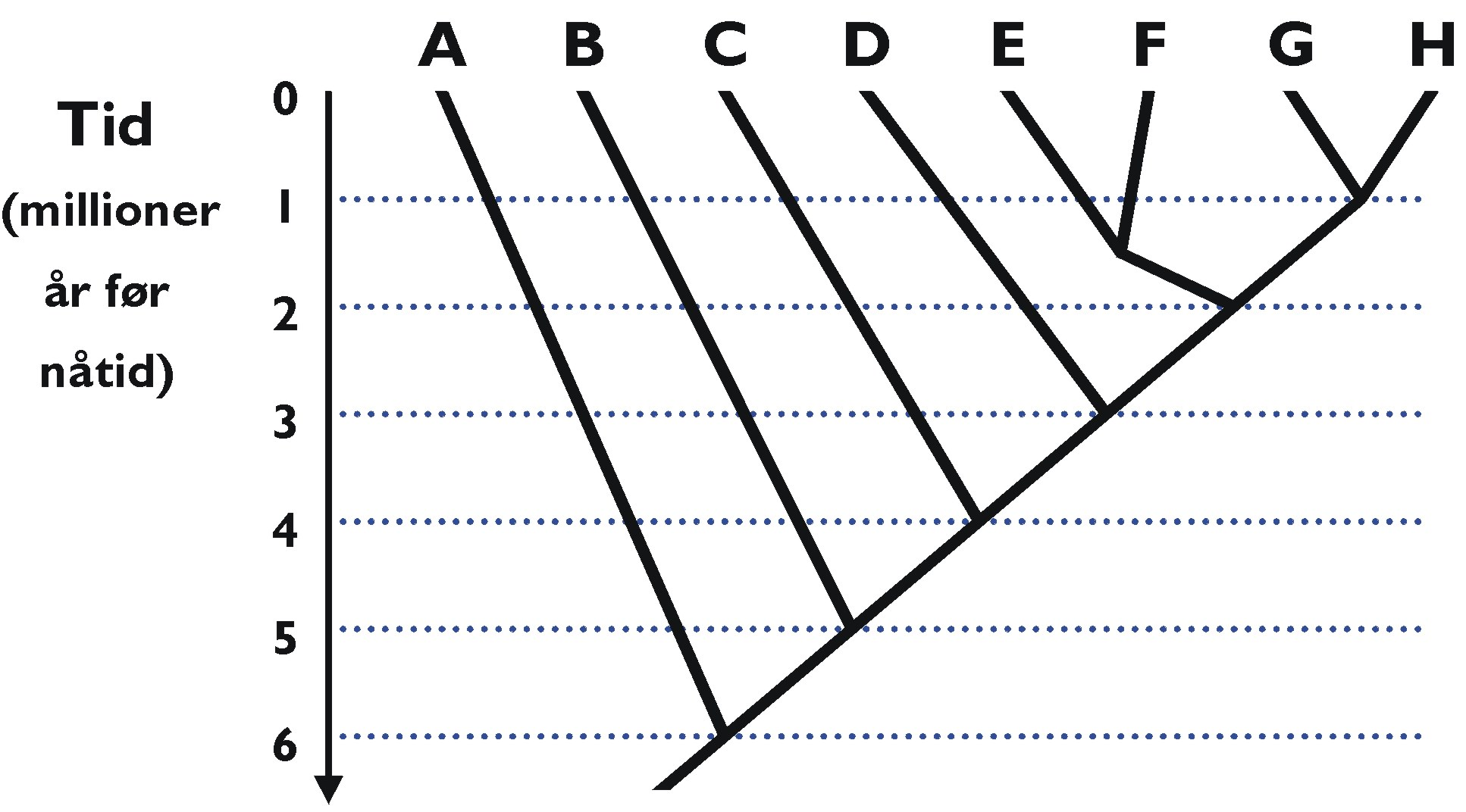 Et kladogram som illustrerer slektskap.